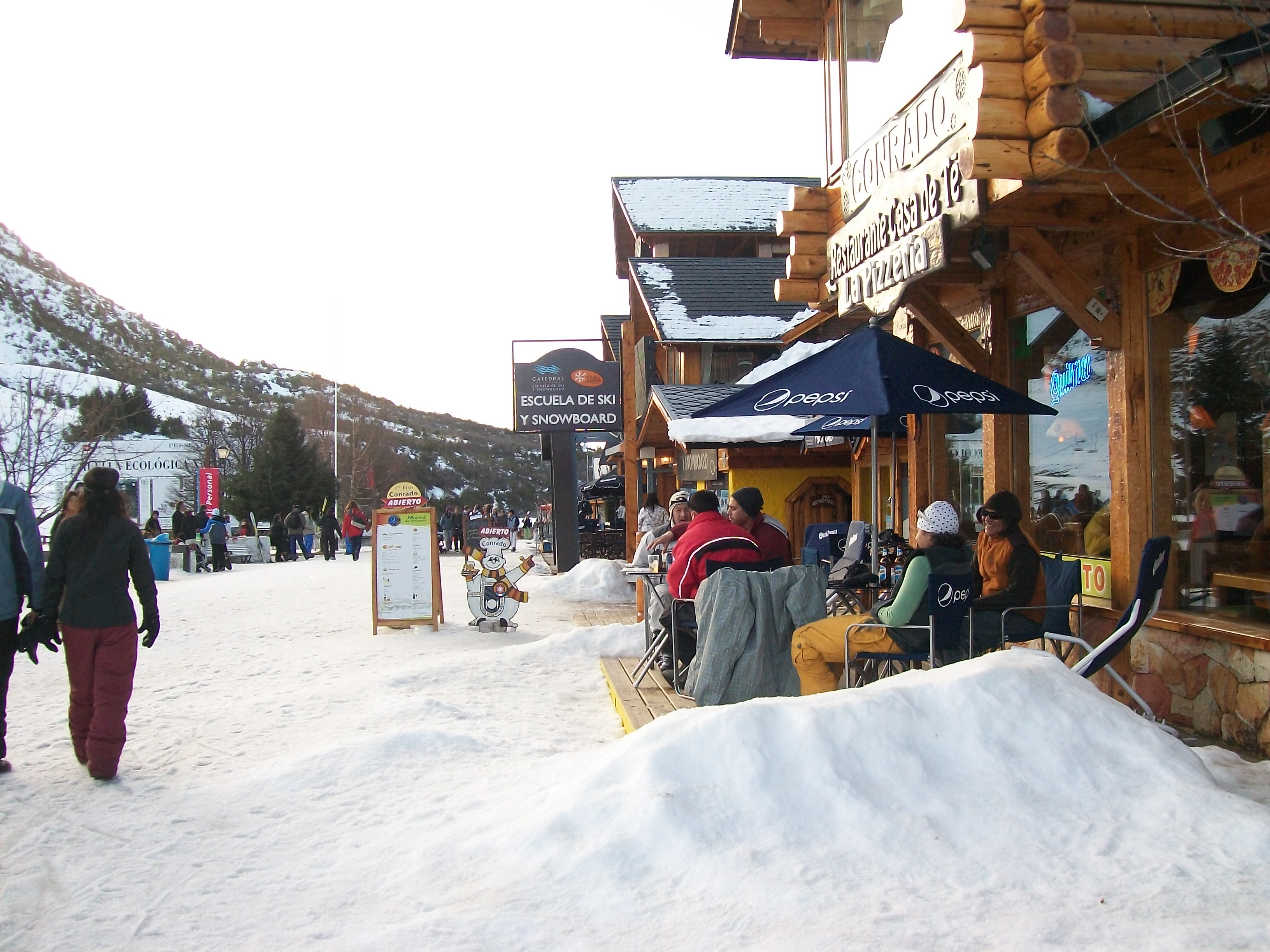 Base del Cerro Catedral en Bariloche. (Patagonia Argentina)